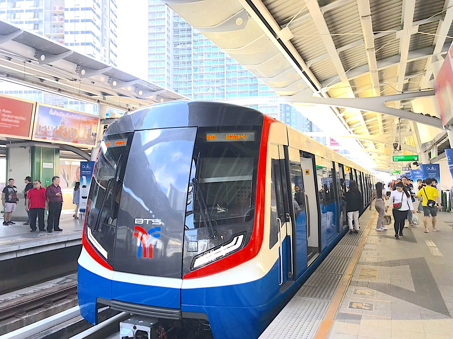 EMU-B3 77 Car on the BTS Skytrain, @Thong Lo Station (E6) November 30th, 2019. The first day that EMU-B3 operates. On the Sukhumvit Line.